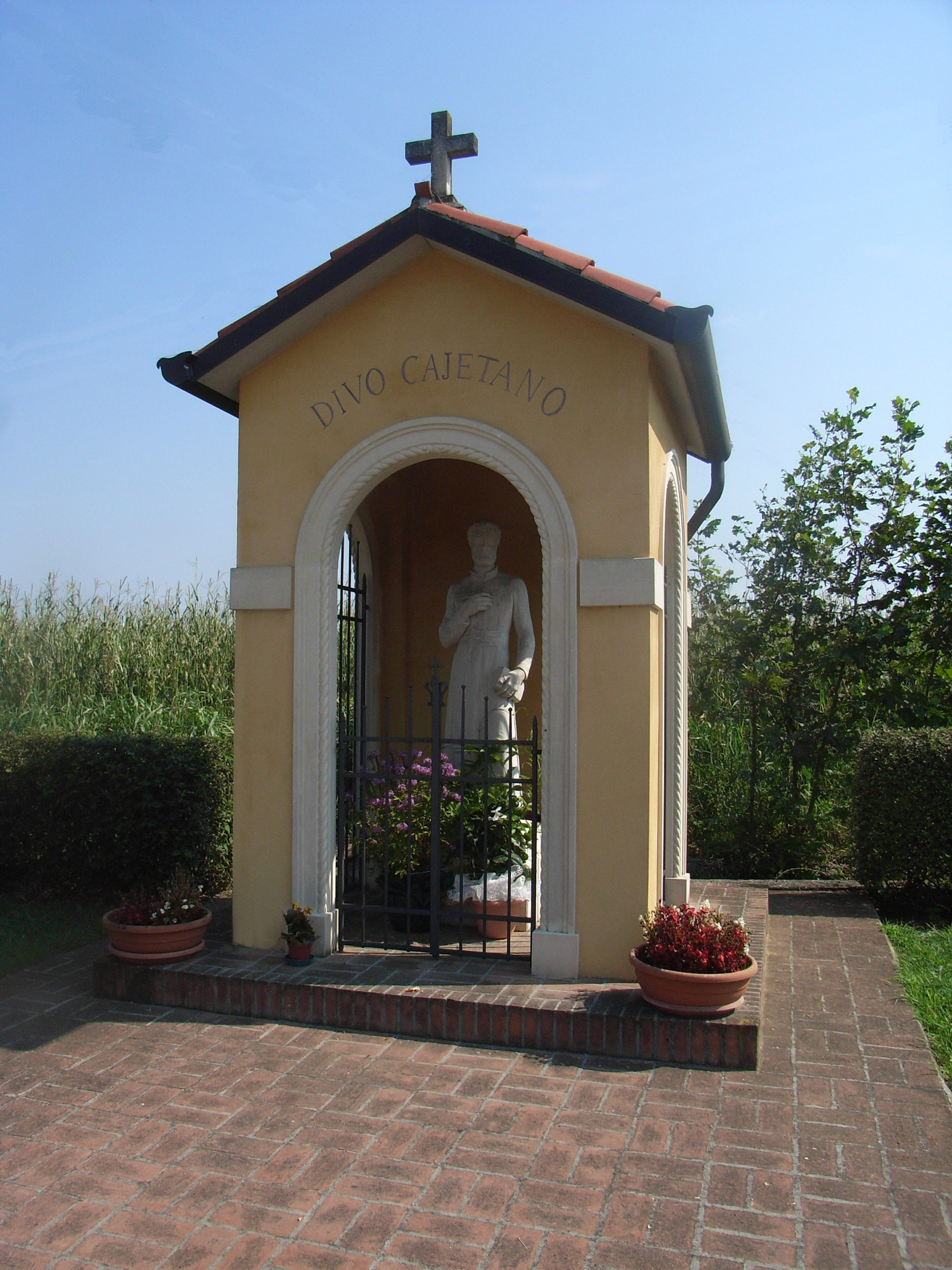 Rampazzo Capitello SanGaetano opera propria 21 agosto 2008 Lingtft